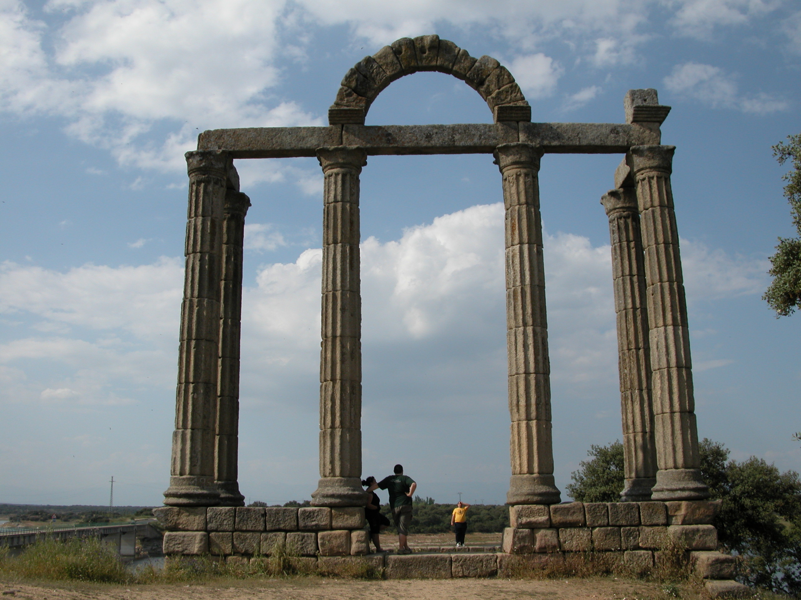 Restos del templo de Júpiter de Augustóbriga.